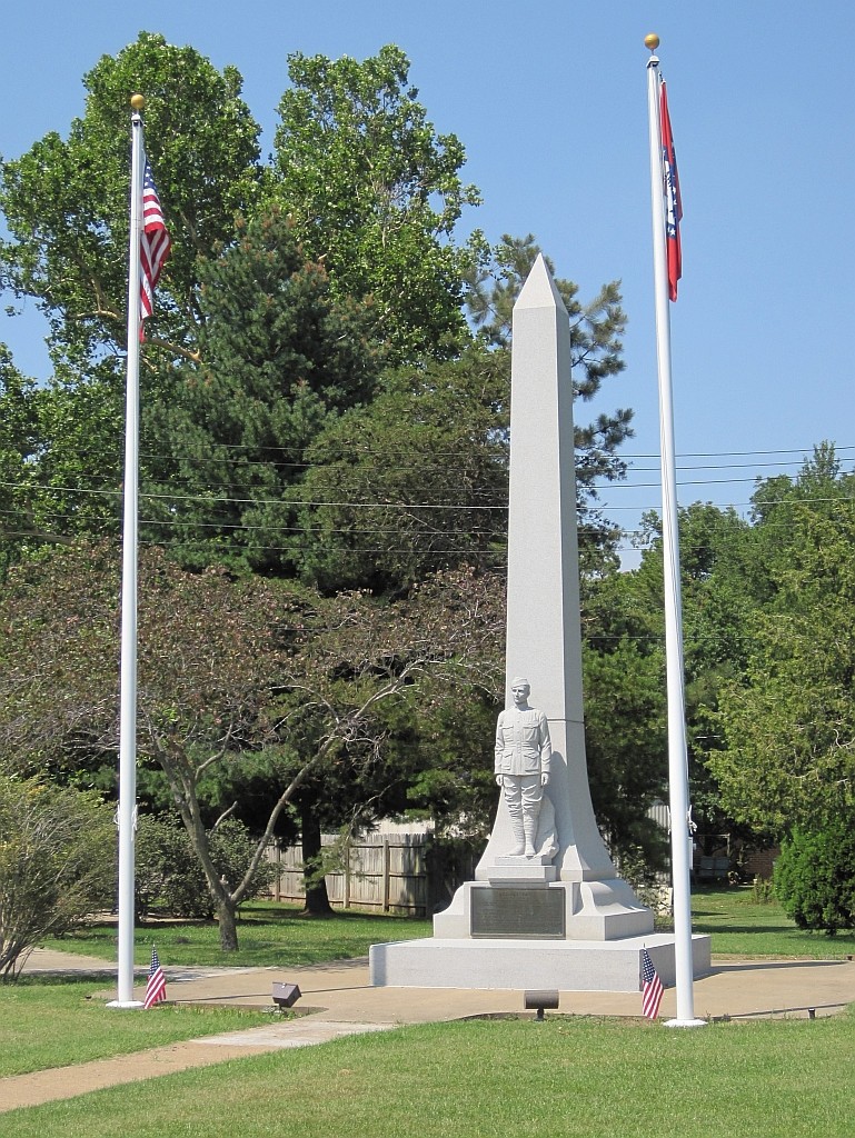 Herman Davis Memorial, Manila, Arkansas